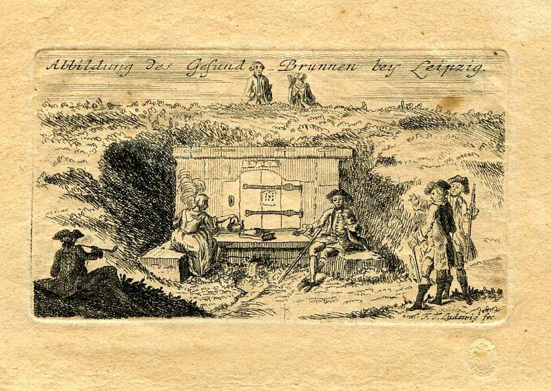 Kupferstich des Marienbrunnens bei Leipzig um 1760